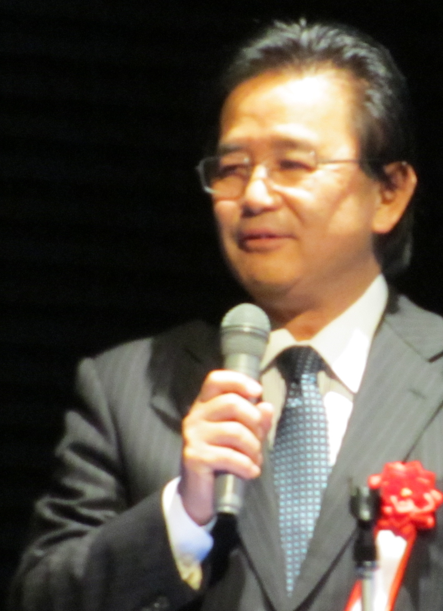 題名：講演中の伊波洋一氏（元沖縄県宜野湾市長、沖縄県議会議員） 場所：「饗宴IV」Grand Hall（品川） 日時：2013年12月22日（日）